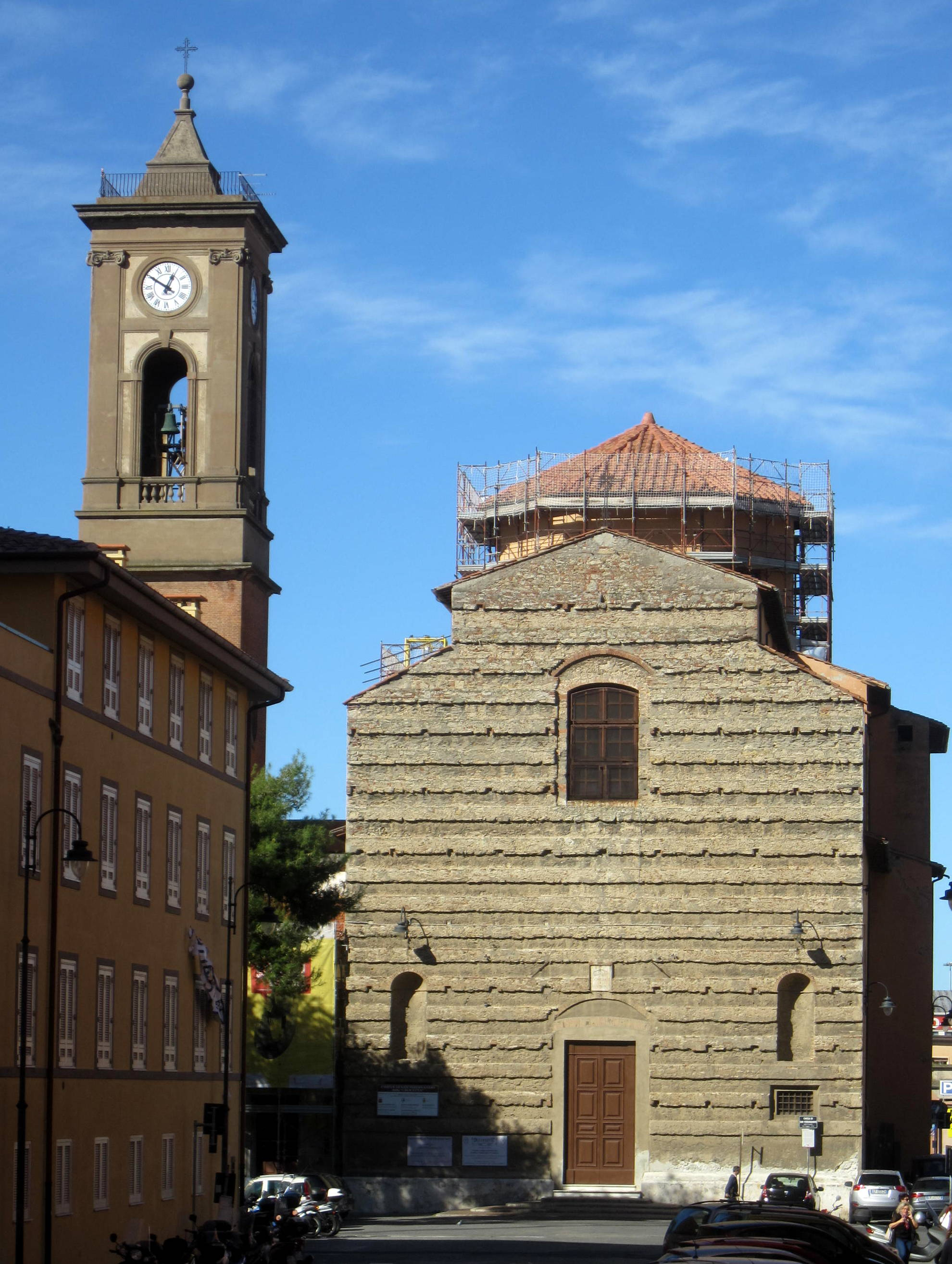 Chiesa di San Ferdinando a Livorno